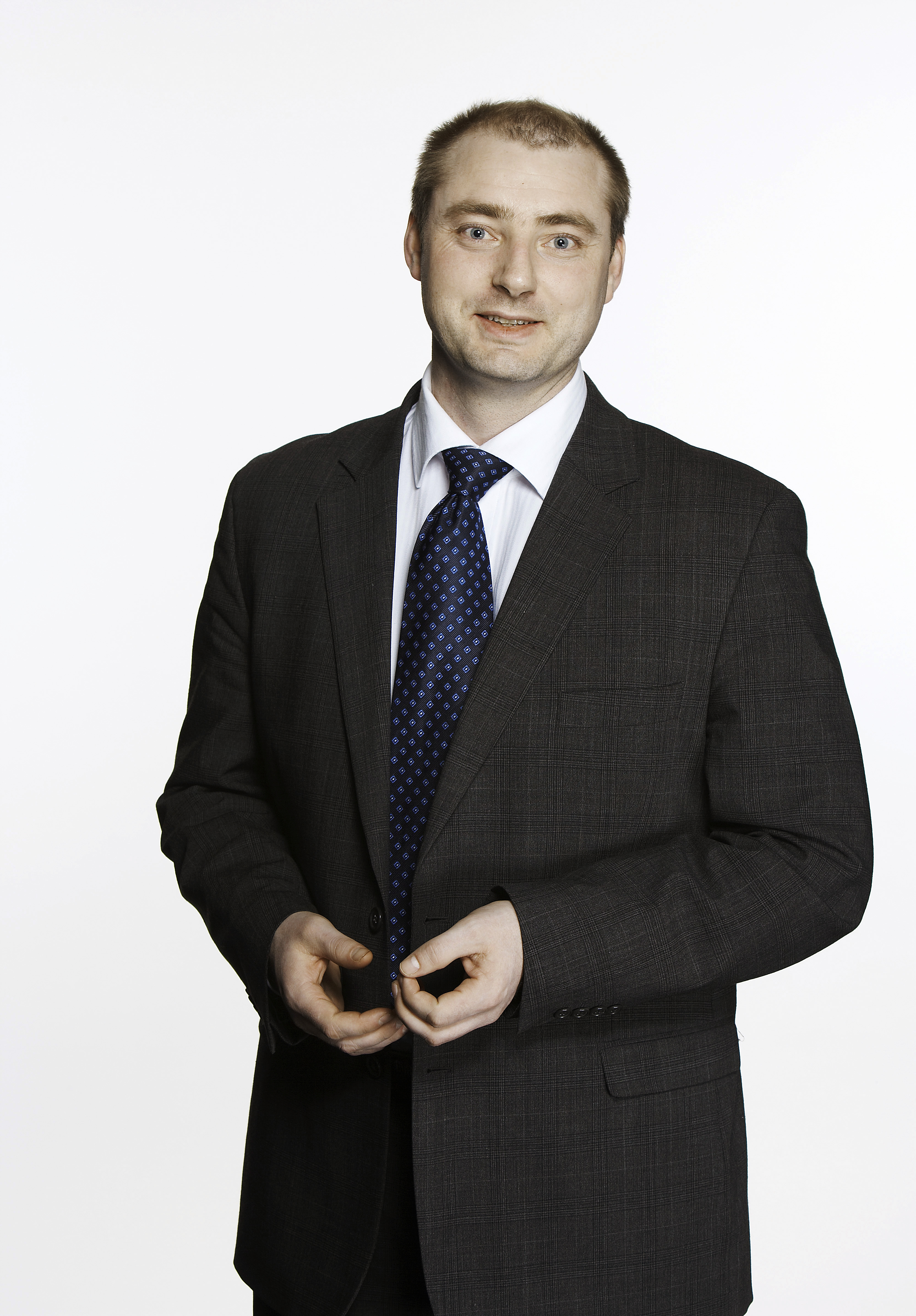 Robert Eriksson